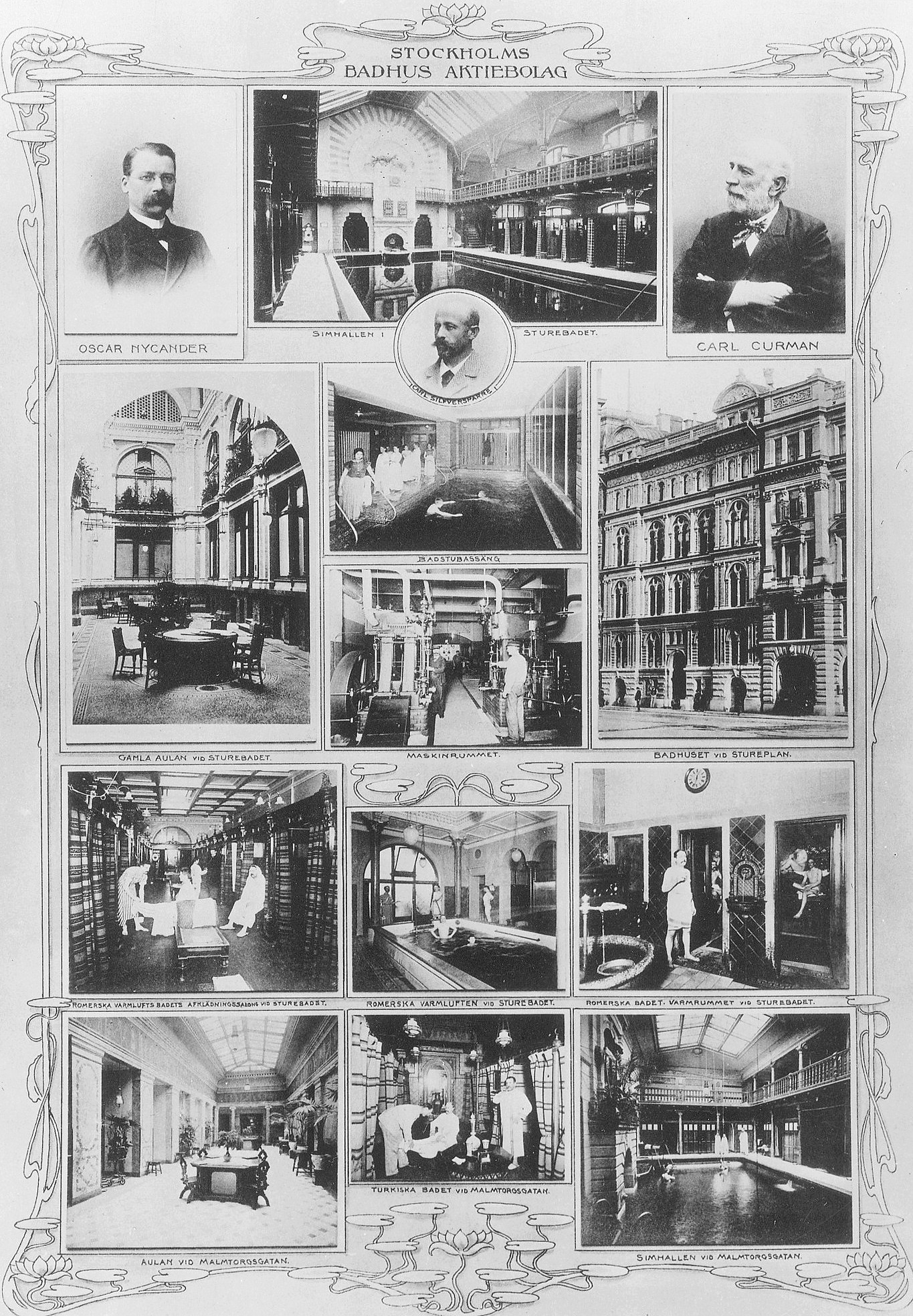 AB Badhuset kollage, kollage över Sturebadet och Malmtorgsbadet